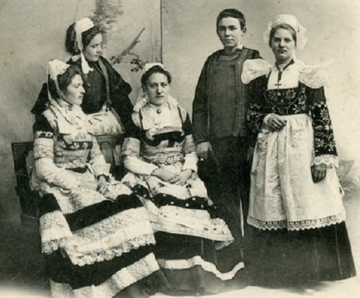 Mariés de Fouesnant au début du XXème siècle (auteur anonyme carte postale collection Villard, Quimper)